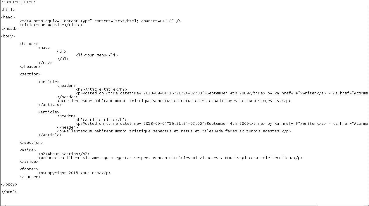 Примерен скрийншот - ето как изглежда примерен HTML код